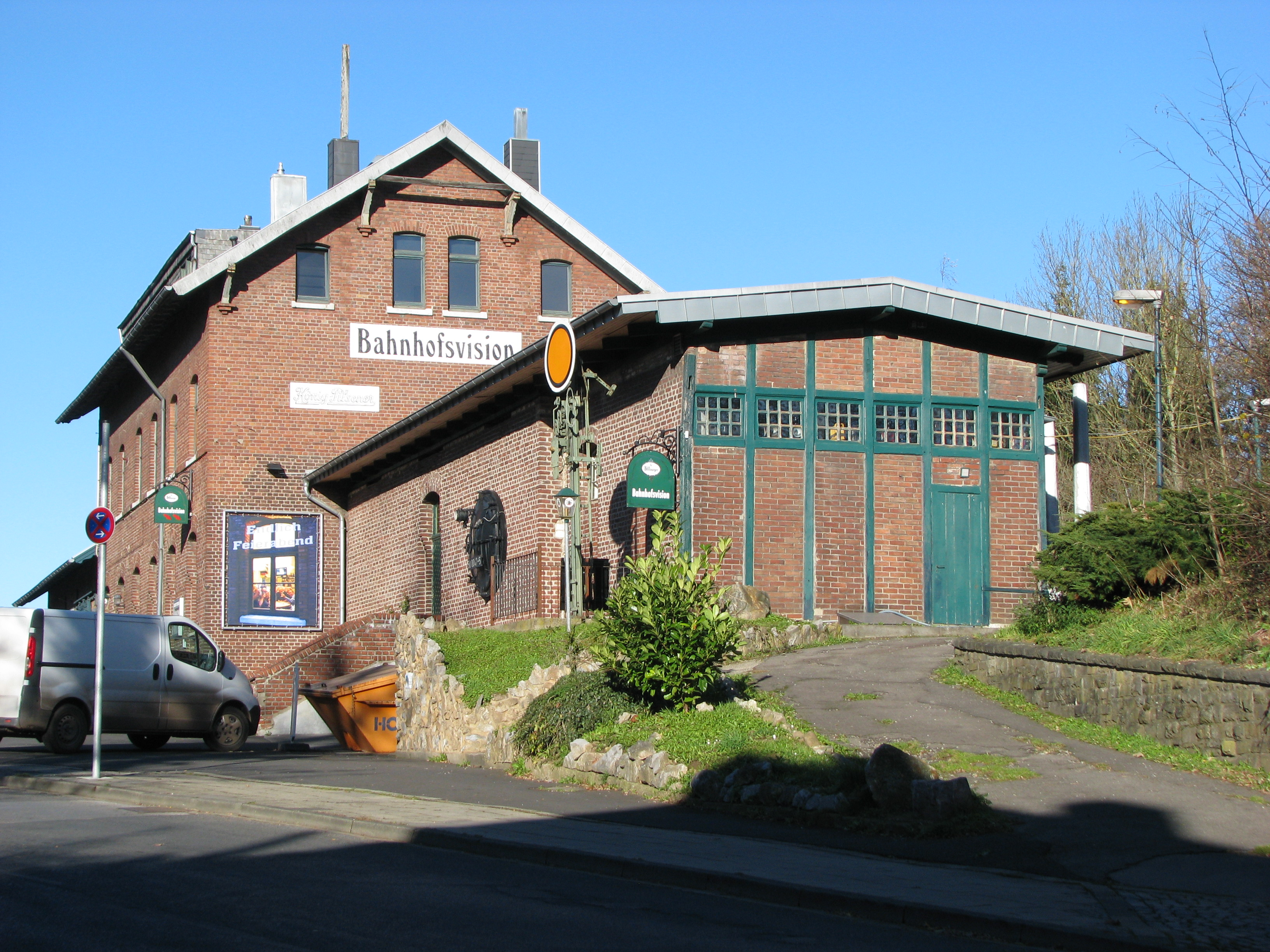 Bahnhof Kornelimünster am Vennbahnweg